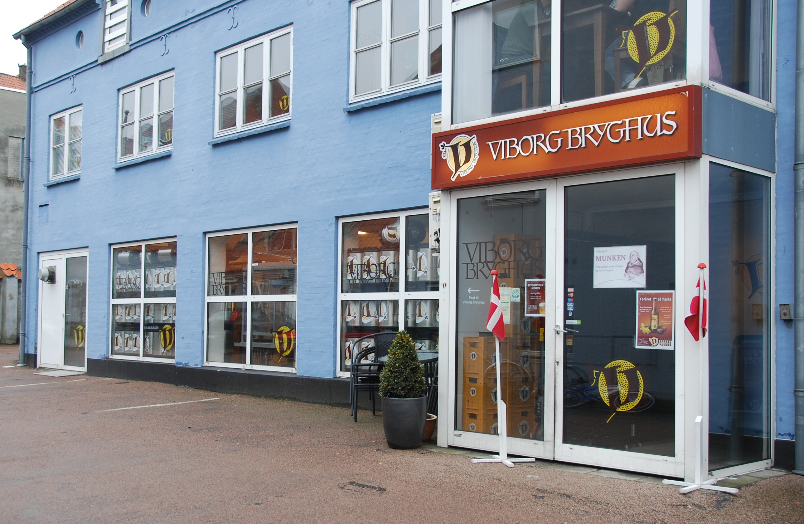 Indgangen til Viborg Bryghus.